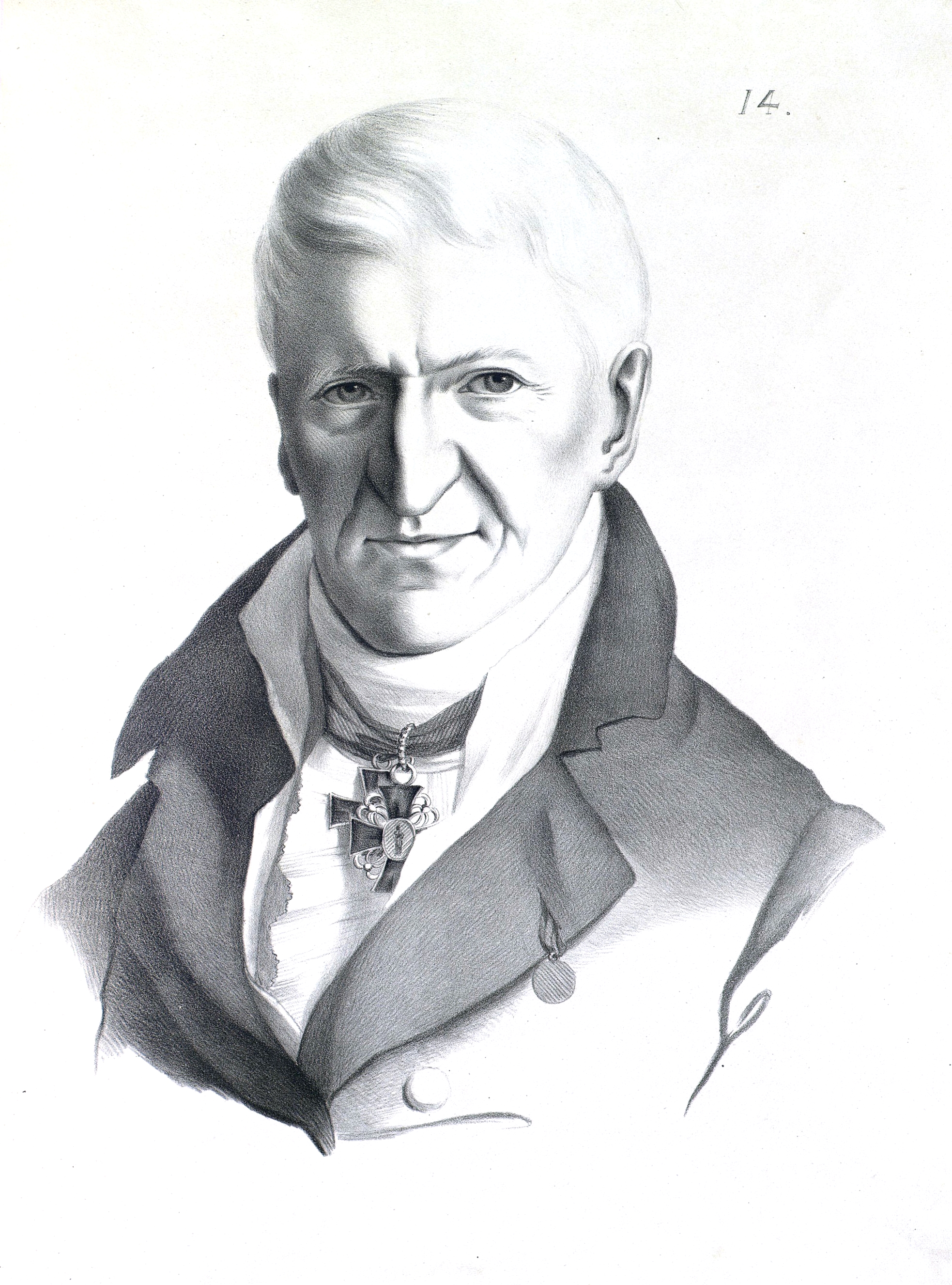 Шуберт, Фёдор Иванович